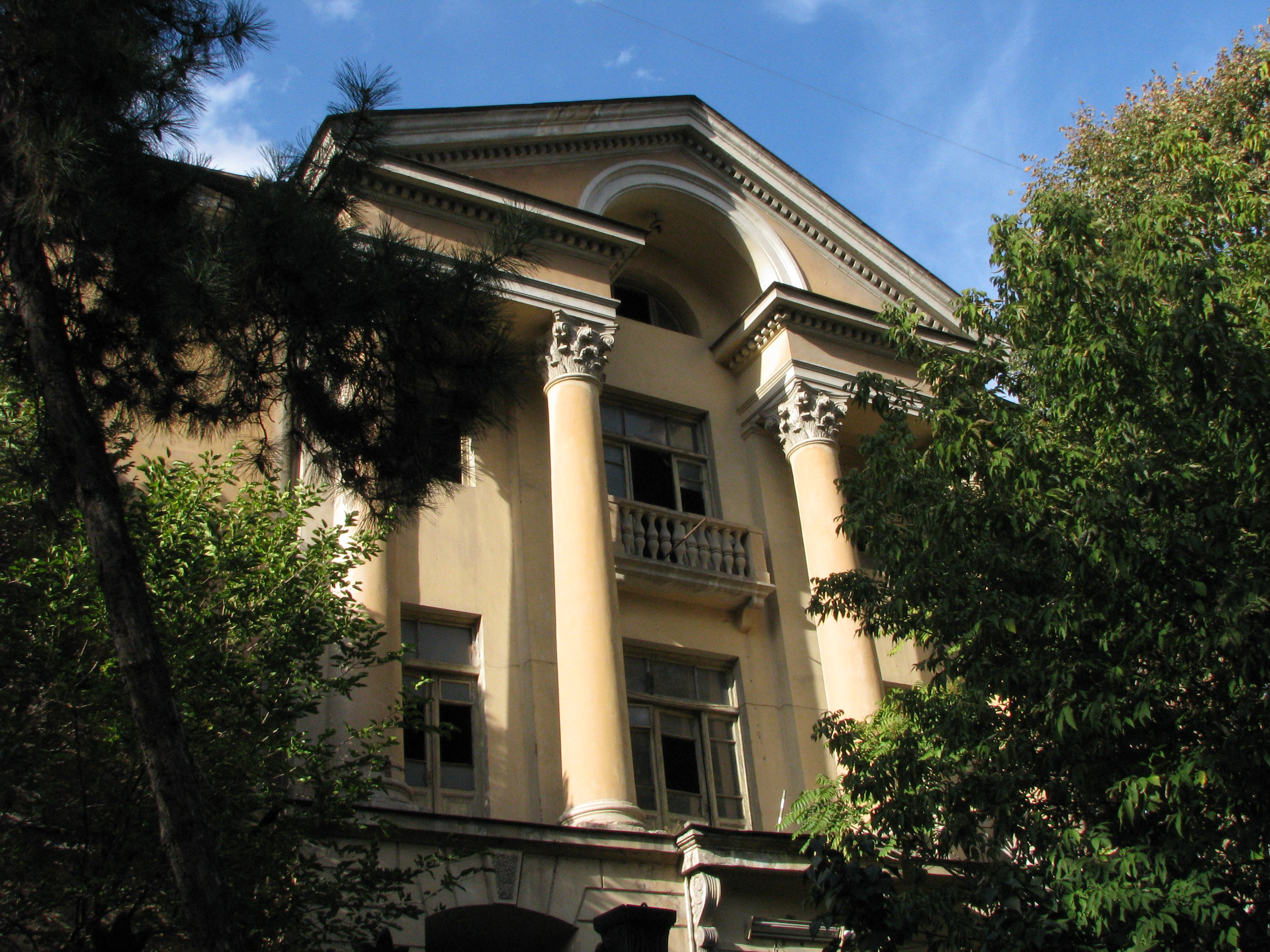 Գիտնականի տունը Մոսկովյան 22 հասցեում